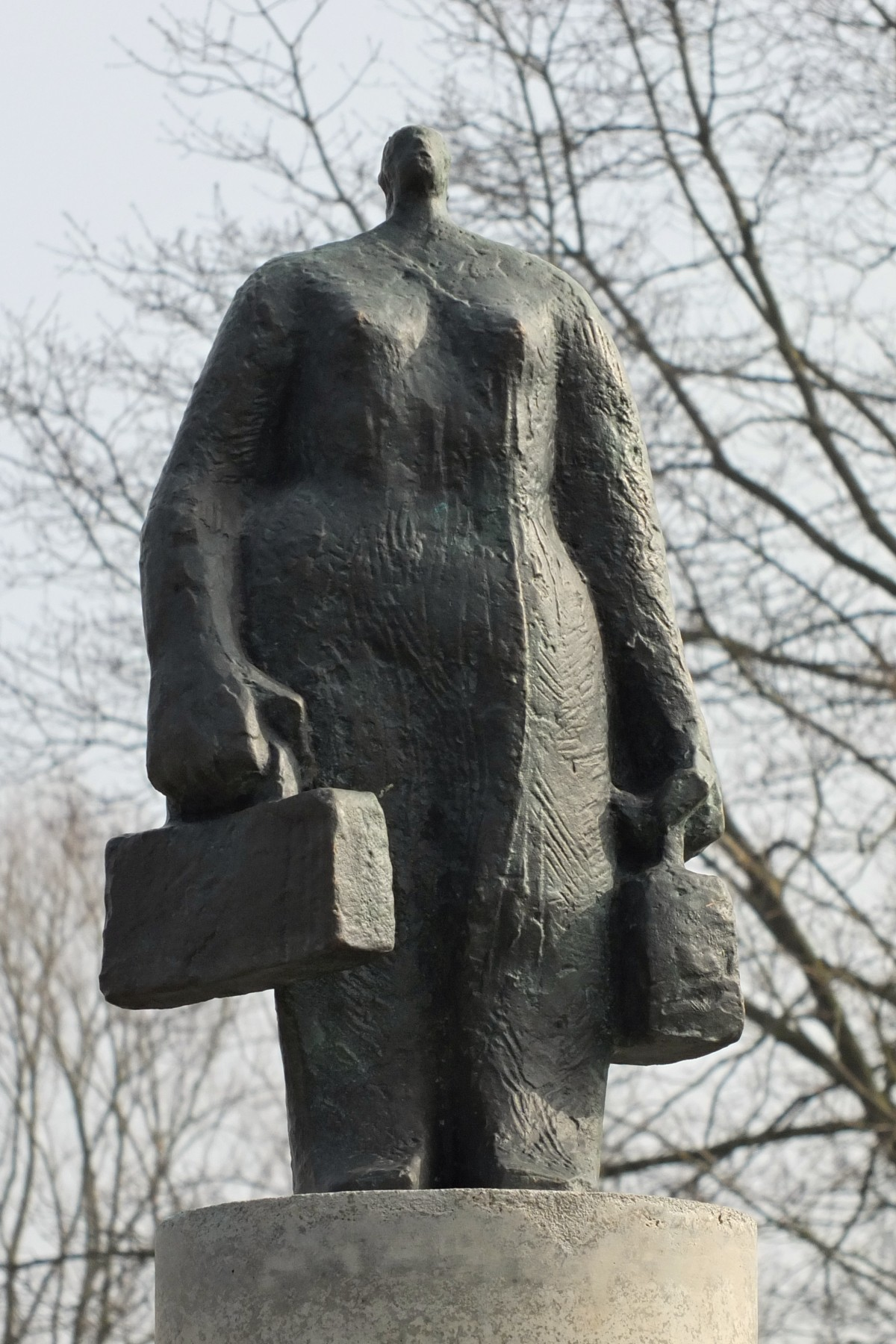 Stele "Die Reisende" von Yvette Gastauer-Claire in Holzbüttgen